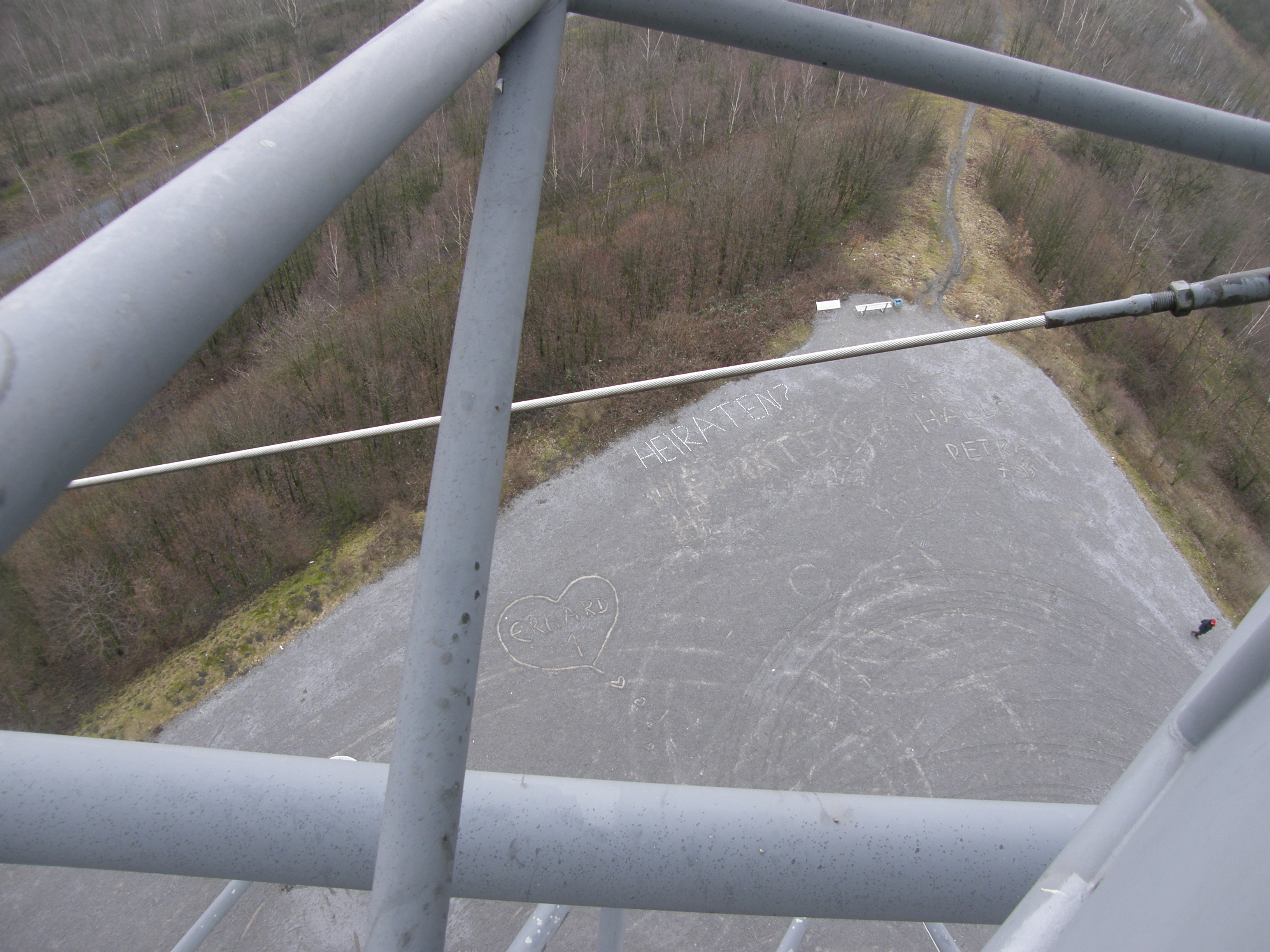 Tetraeder in Bottrop Aus Steinen gelegter Heiratsantrag